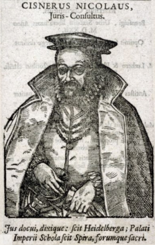 Nikolaus Cisnerus (1529-1583), German scholar